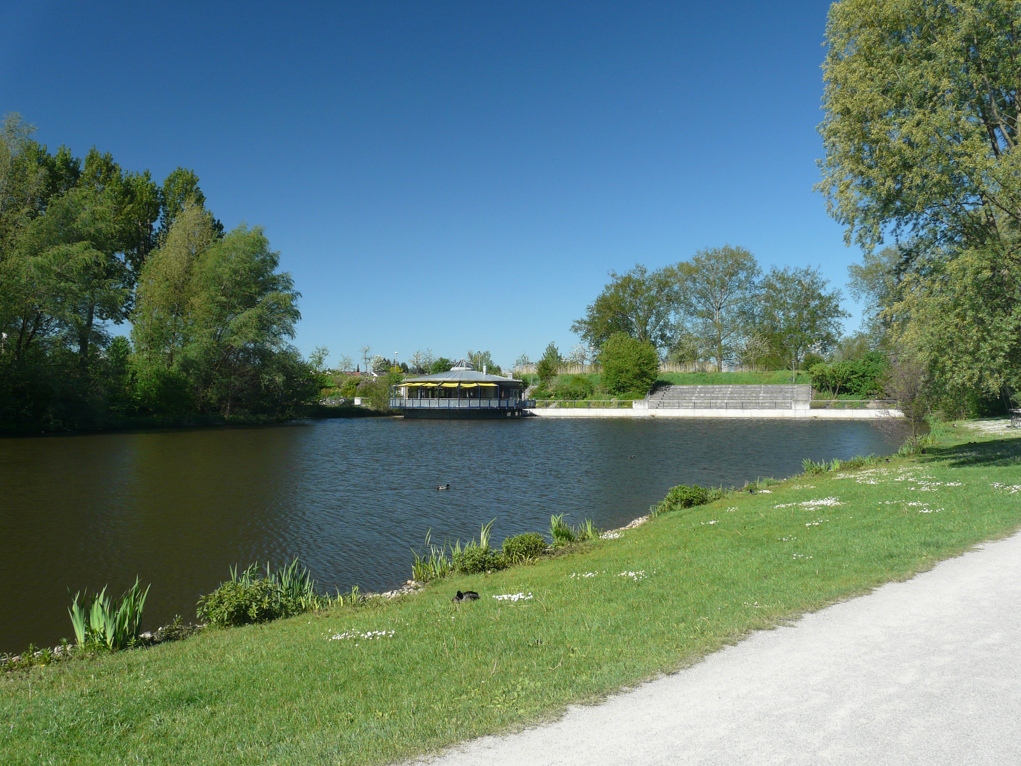 Künstlich angelegter See im LGS-Park von Neumarkt in der Oberpfalz